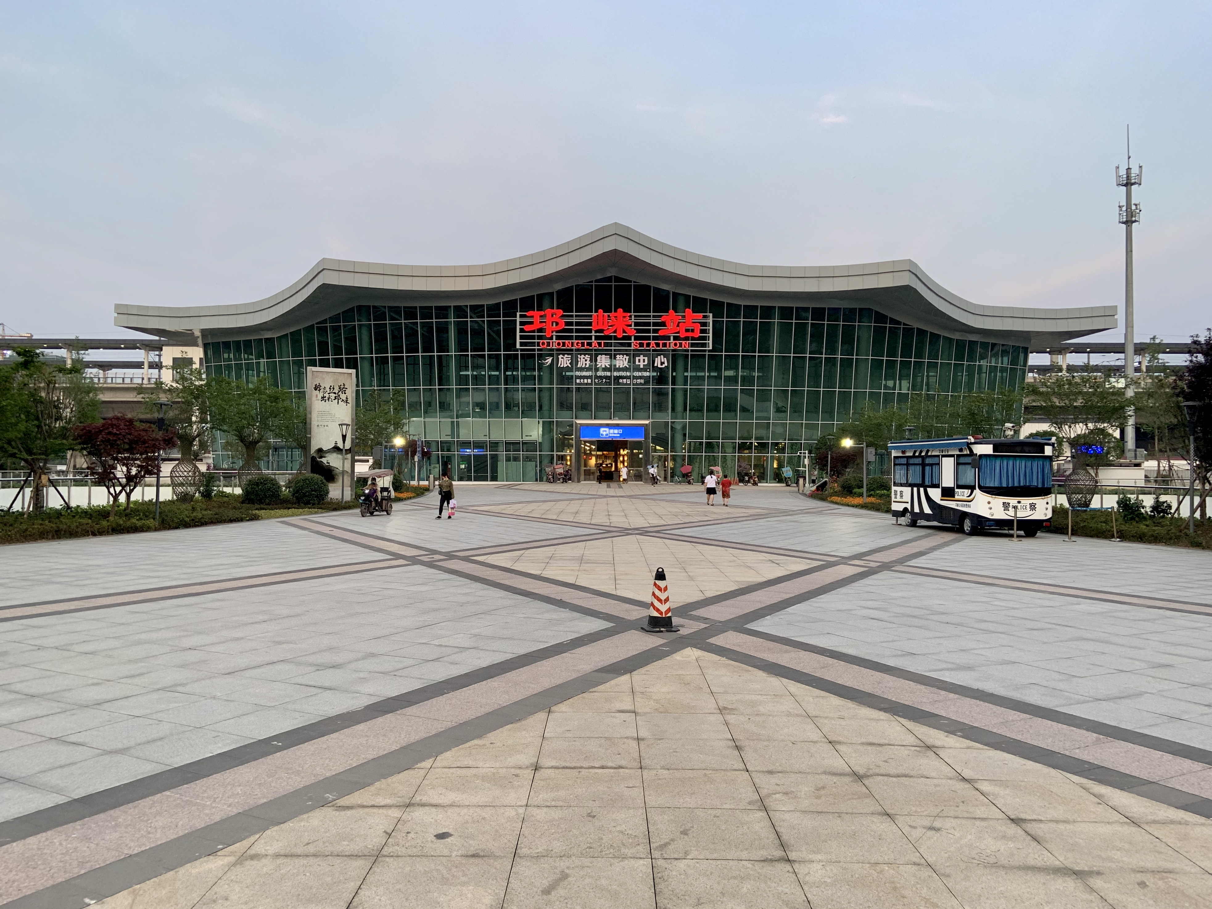 邛崃站正面，标称邛崃站的建筑实际为后来建成的邛崃旅游集散中心